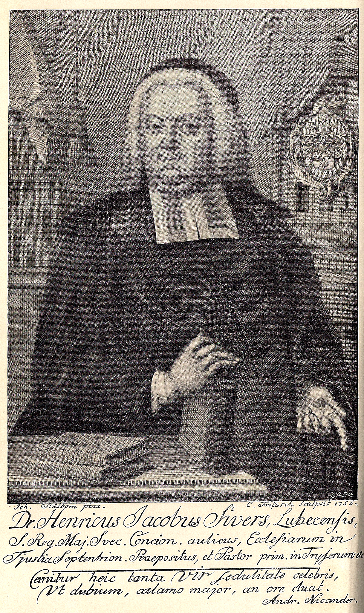 Frontespis till boken Westerwiks Historia och Beskrifning, 1758 by Henric Jacob Sivers. Illustrationen av Joh. Stålbom, pirix och C. Fritzsch, scalpsit 1756